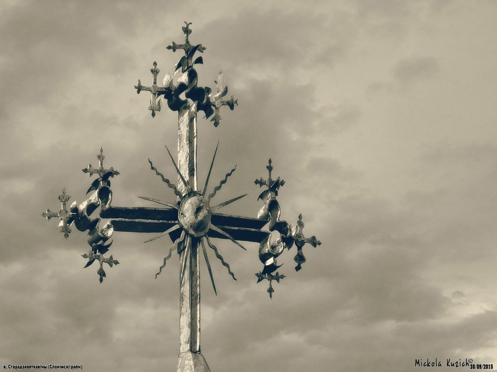 Старадзявяткавічы. Свята-Параскева-Пятніцкая царква. Крыж